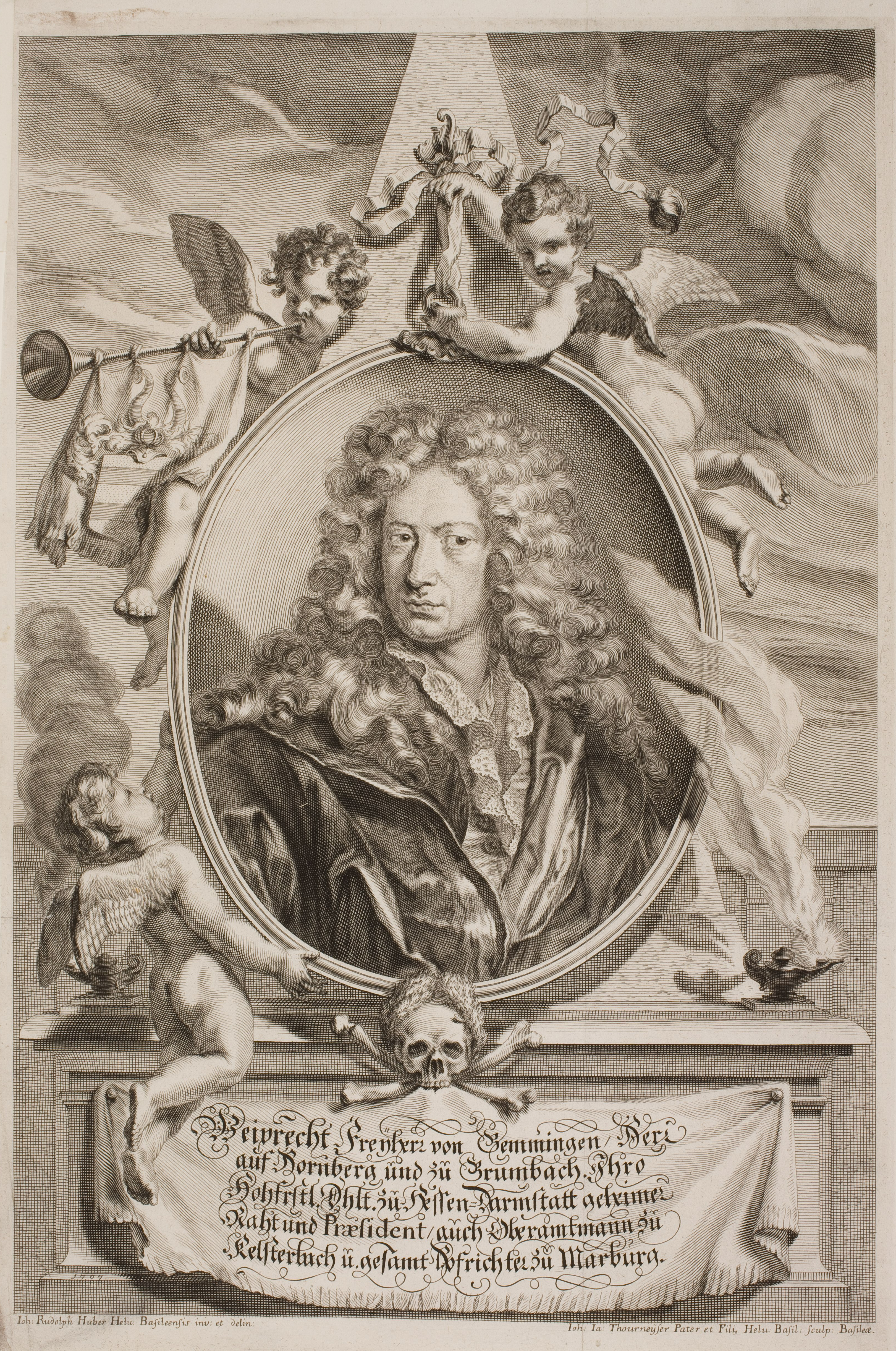 Bildnis Weiprecht Frhr. von Gemmingen(-Hornberg); aus einer Leichenpredigt Kupferstich, 426 x 281 mm (Blatt) Wolfenbüttel, Herzog August Bibliothek, Inventar-Nr. A 7583